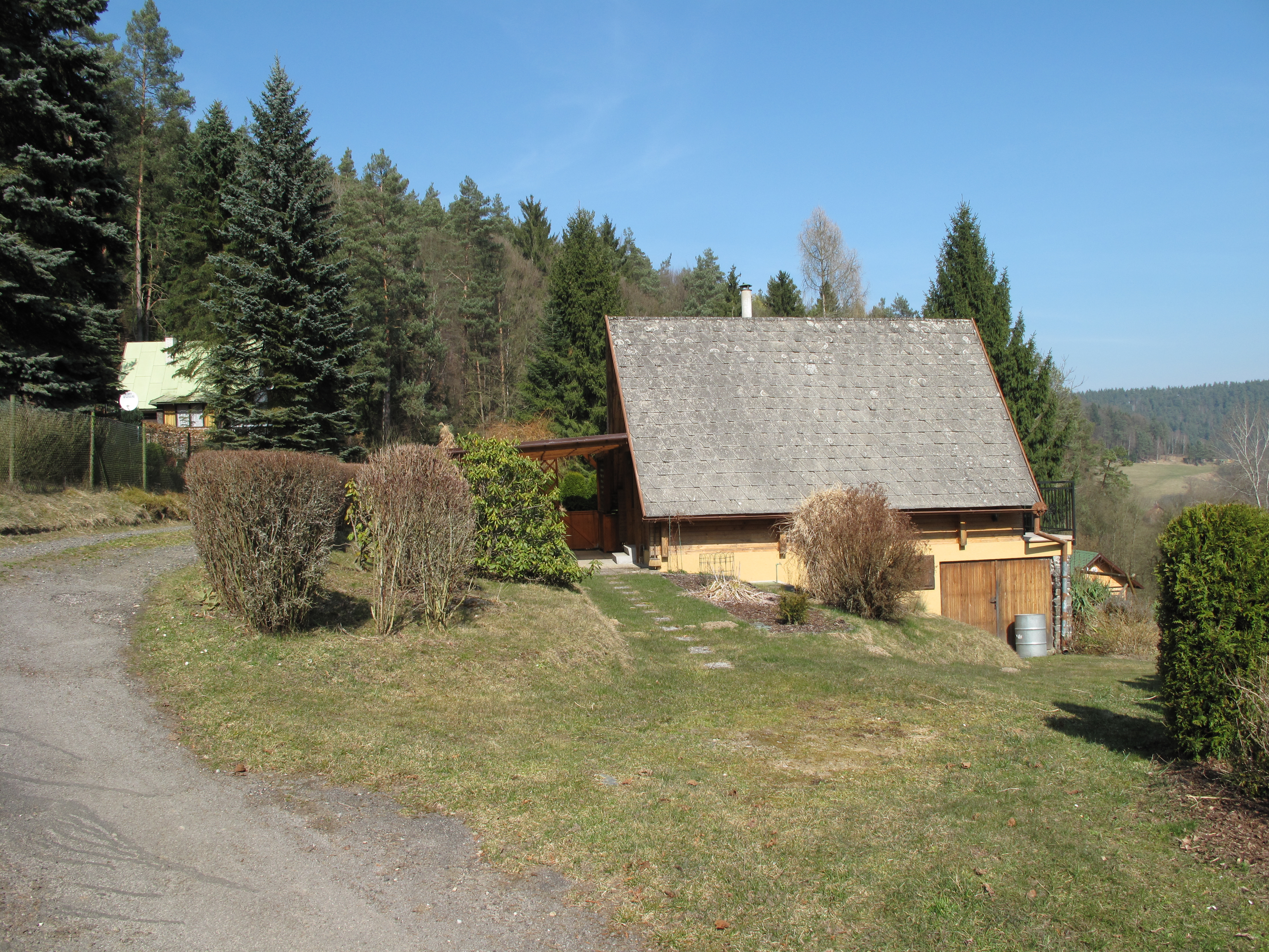 Chata v Buřínsku 2. díl. Okres Mladá Boleslav, Česká republika.